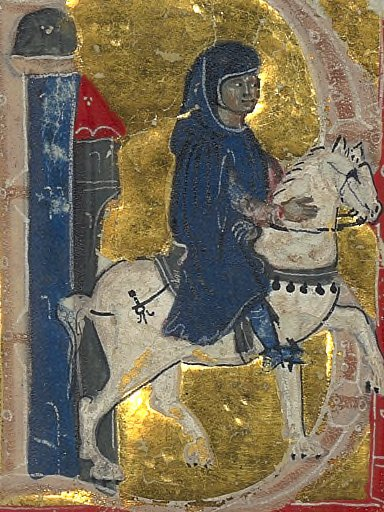 Chansonnier provençal